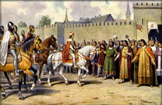 Josef Mathauser (1846-1917) - Václav II. přijíždí roku 1282 do Prahy